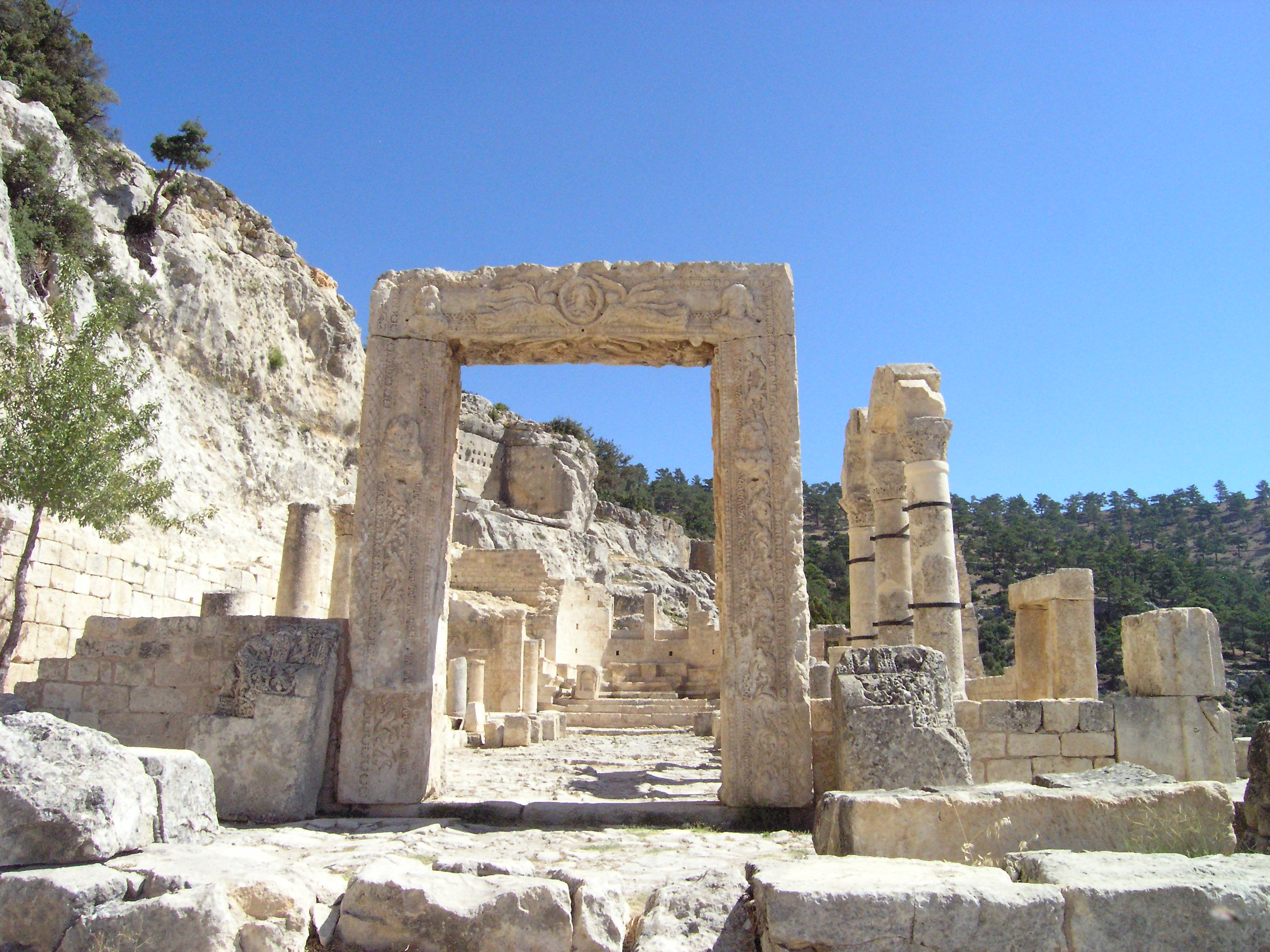 Alahan "Kloster", frühbyzantinische Pilgeranlage in der Türkei (Provinz Mersin), Westbasilika, Eingangsportal